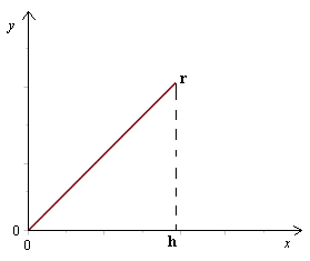 Tilhørende skitse til volumen af kegle bevis